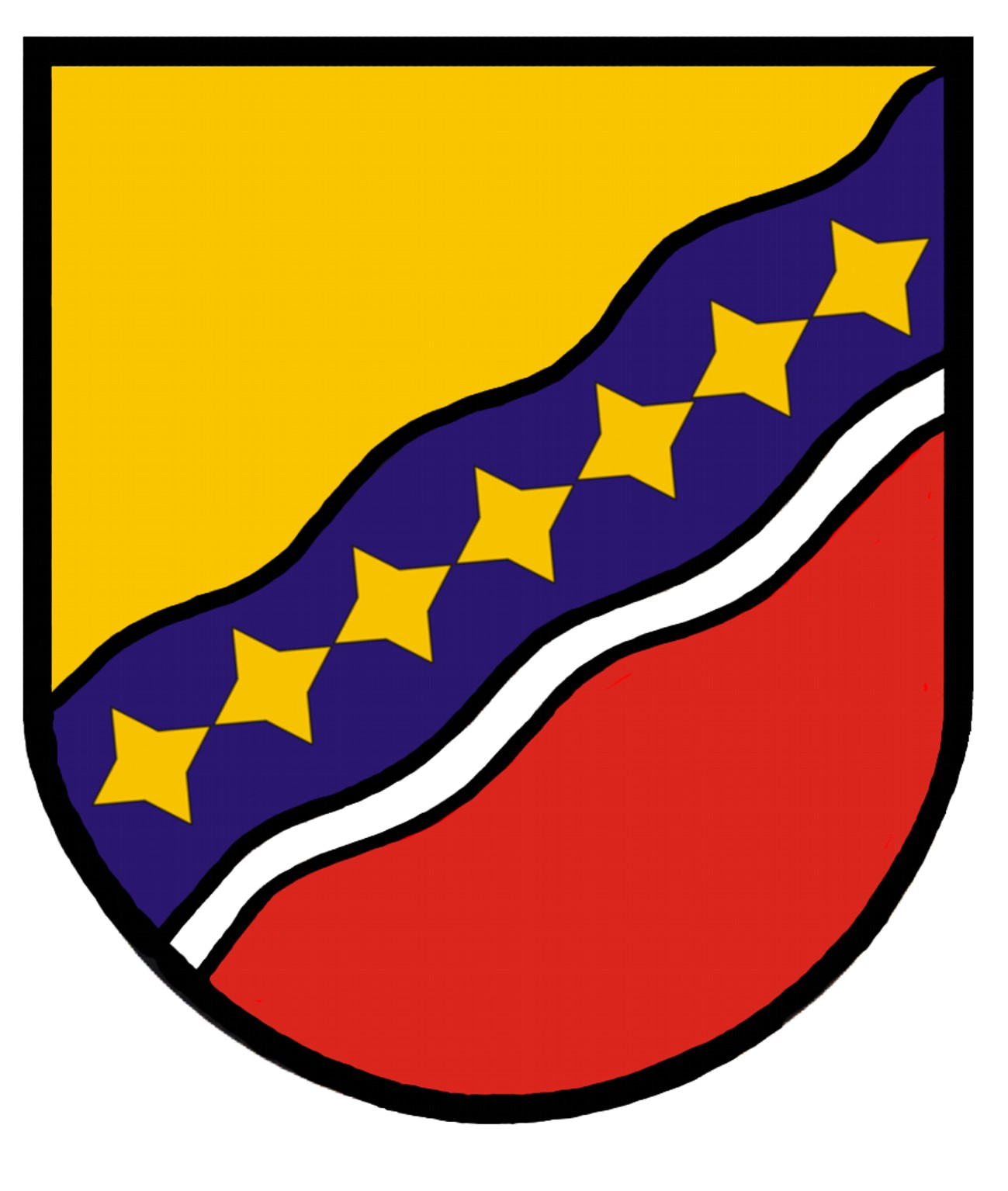 Wappen der Gemeinde Stadtkyll